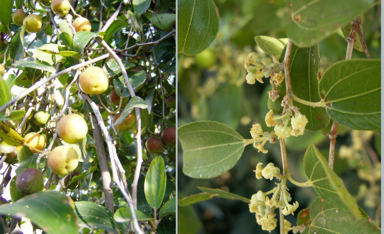 Ziziphus spina-christi (L.) Desf. (שיזף מצוי), Tel-Aviv.